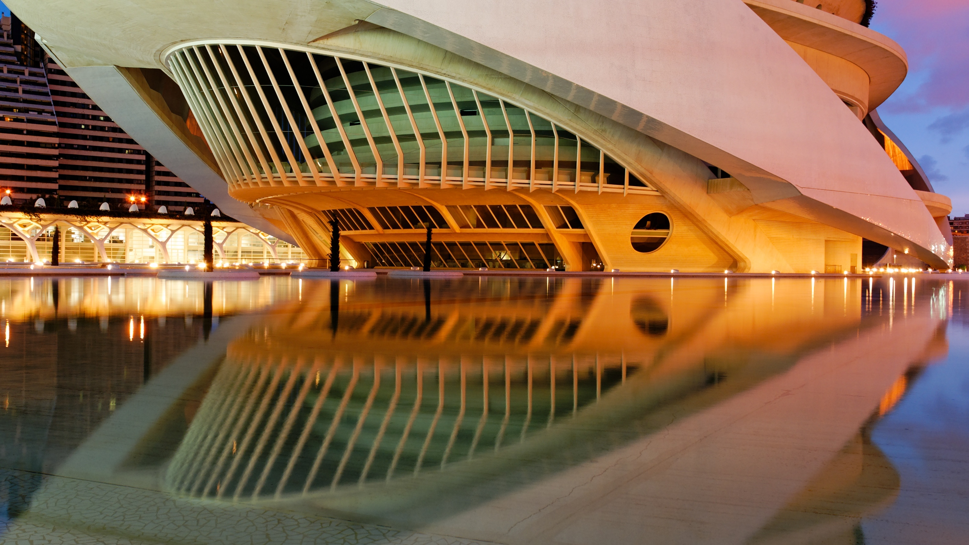 Palau de les Arts del Ciutat de les Arts i les Ciències.